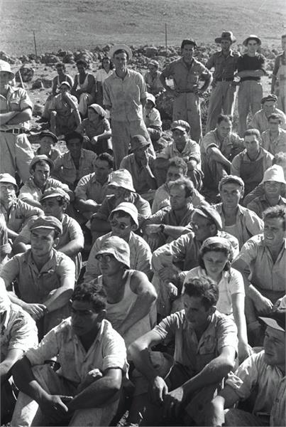 "להבות הבשן" - עלית הקיבוץ "להבות" על אדמת "חיאם אל ואליד" . חברי הקיבוץ העולה מקשיבים לנאומים בשעת הטקס